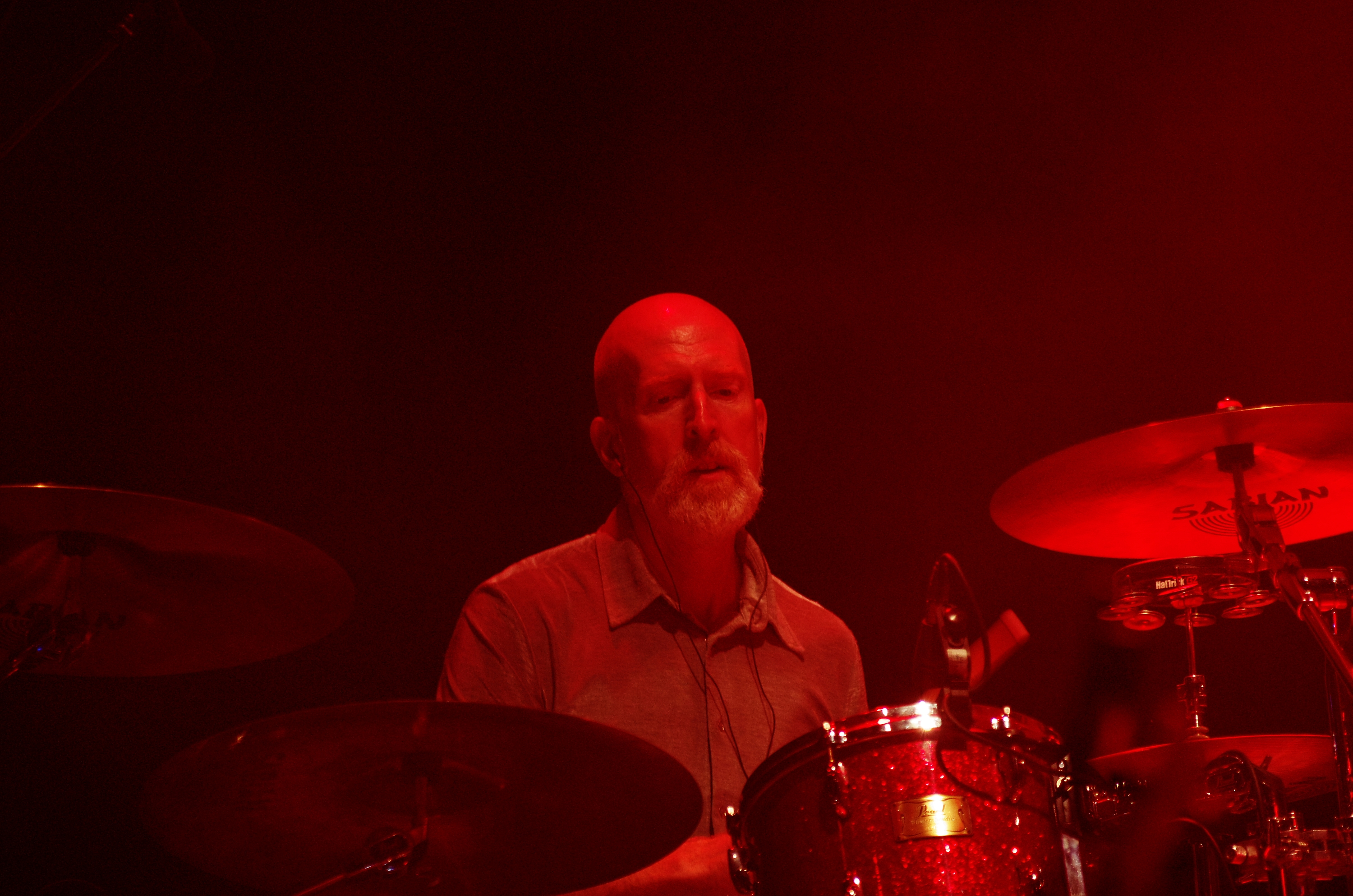 James (band) auf dem Haldern Pop Festival 2013. Hauptbühne. Besetzung: Tim Booth (Gesang) Jim Glennie (Bass) Larry Gott (Gitarre) Saul Davies (Gitarre, Violine, Percussion) Mark Hunter (Keyboards) Dave Baynton-Power (Schlagzeug) Andy Diagram (Trompete, Percussion)